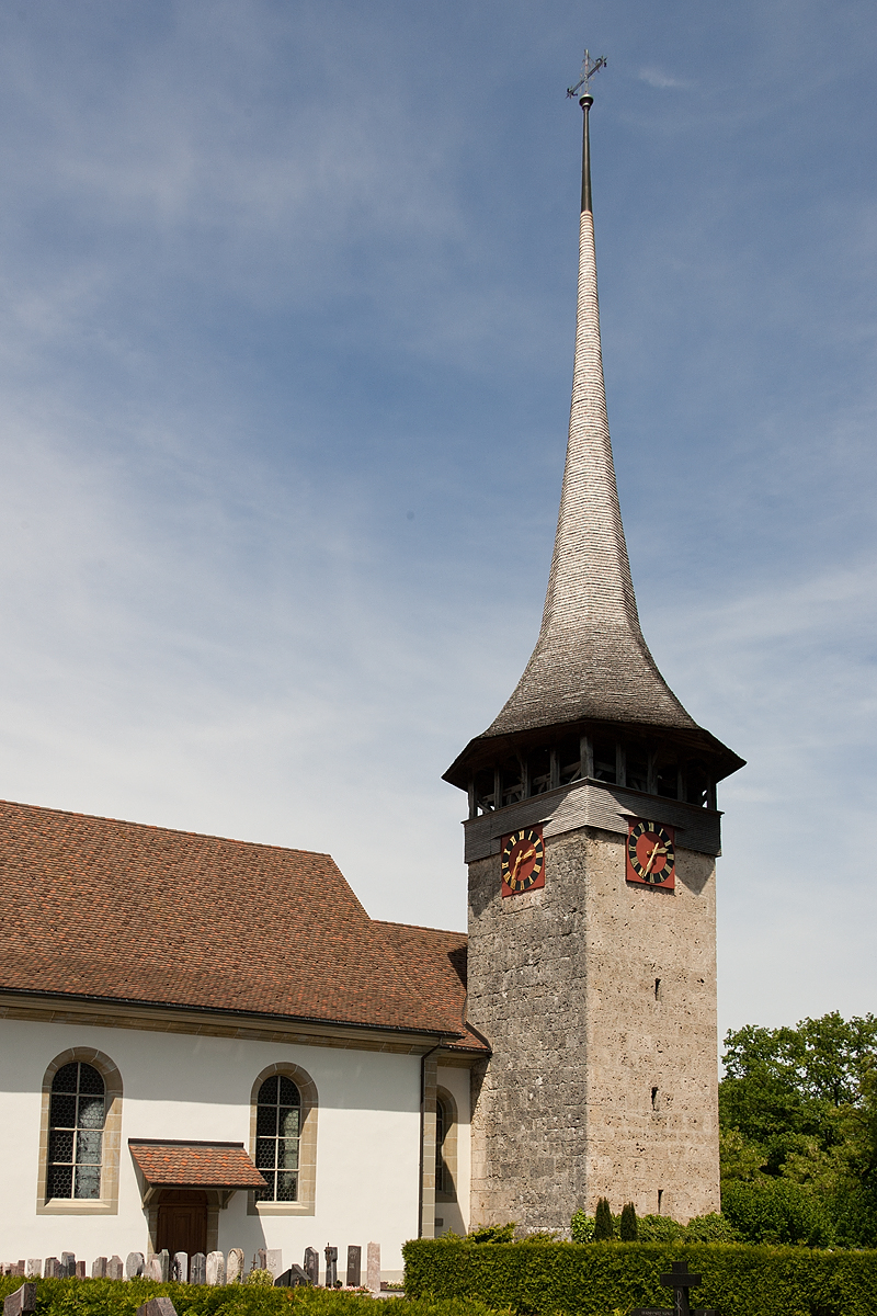 Pfarrkirche St. Jakobus d. Ä. in Bösingen (FR)